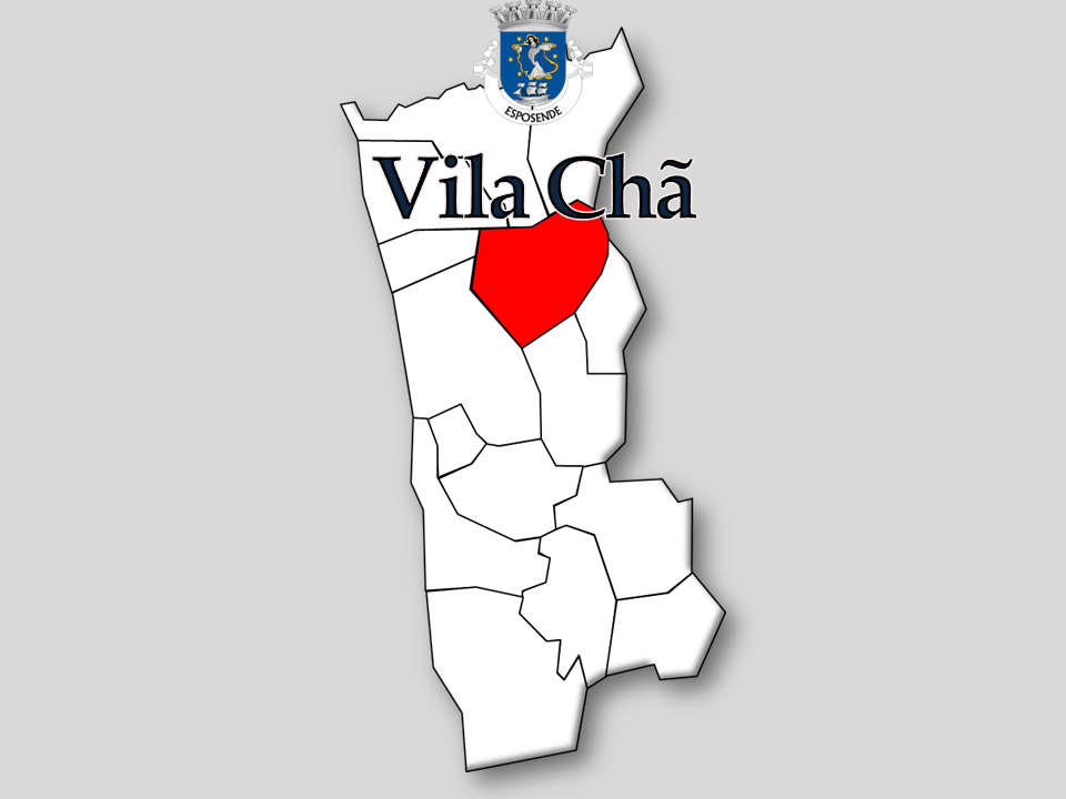 Censo 1864/2011